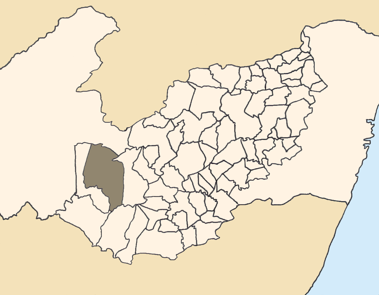 Mapa da mesorregião Agreste de Pernambuco (Brasil) subdivida em municípios. Em destaque, o município de Buíque. Map of the brazilian state of Pernambuco (mesorregião Agreste) showing the city of Buíque. Imagem tratada com o GIMP. Image made with GIMP.